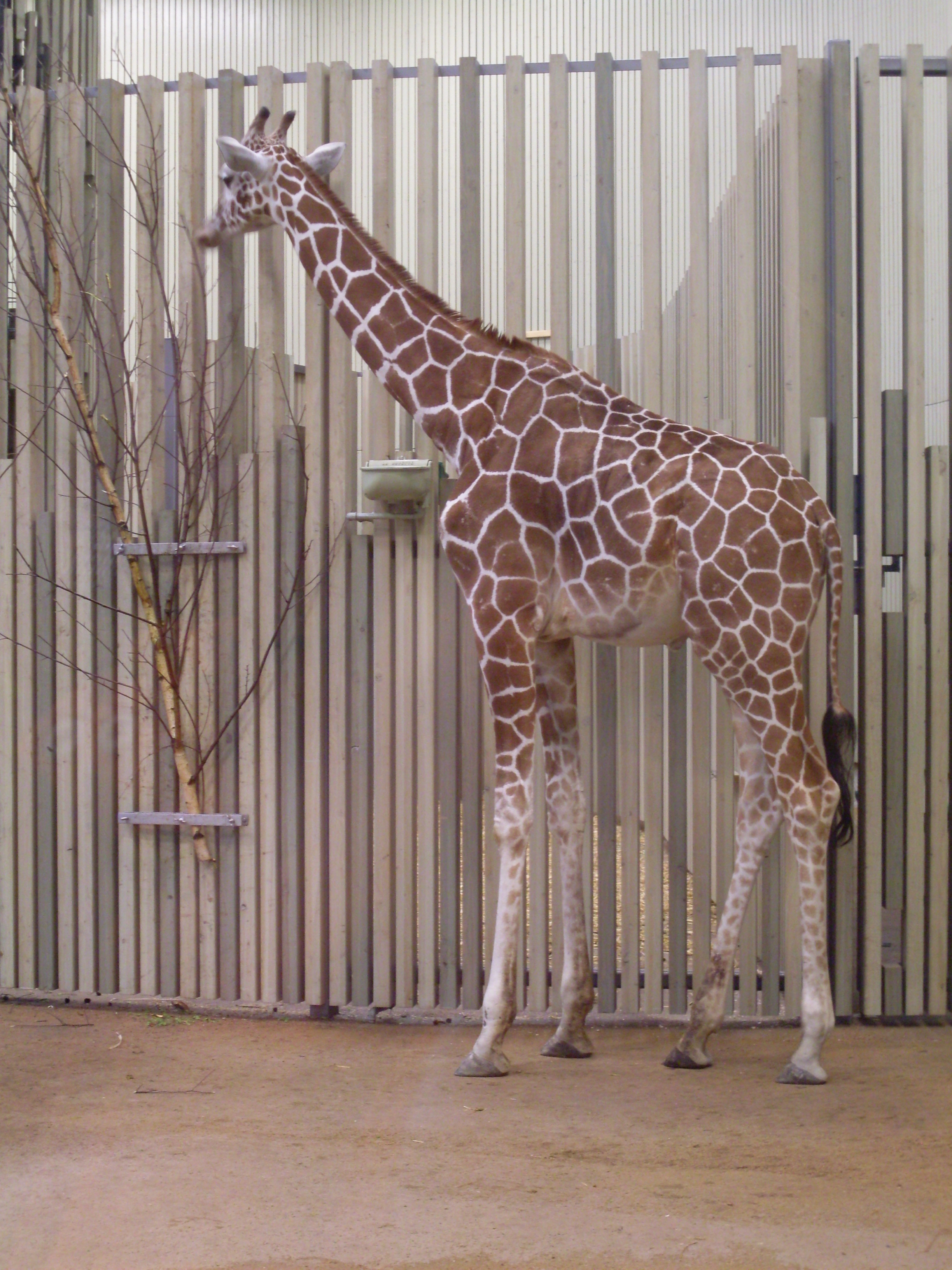 Netzgiraffe ULEMBO im neu entstandenen Giraffenhaus im Zoo Dresden